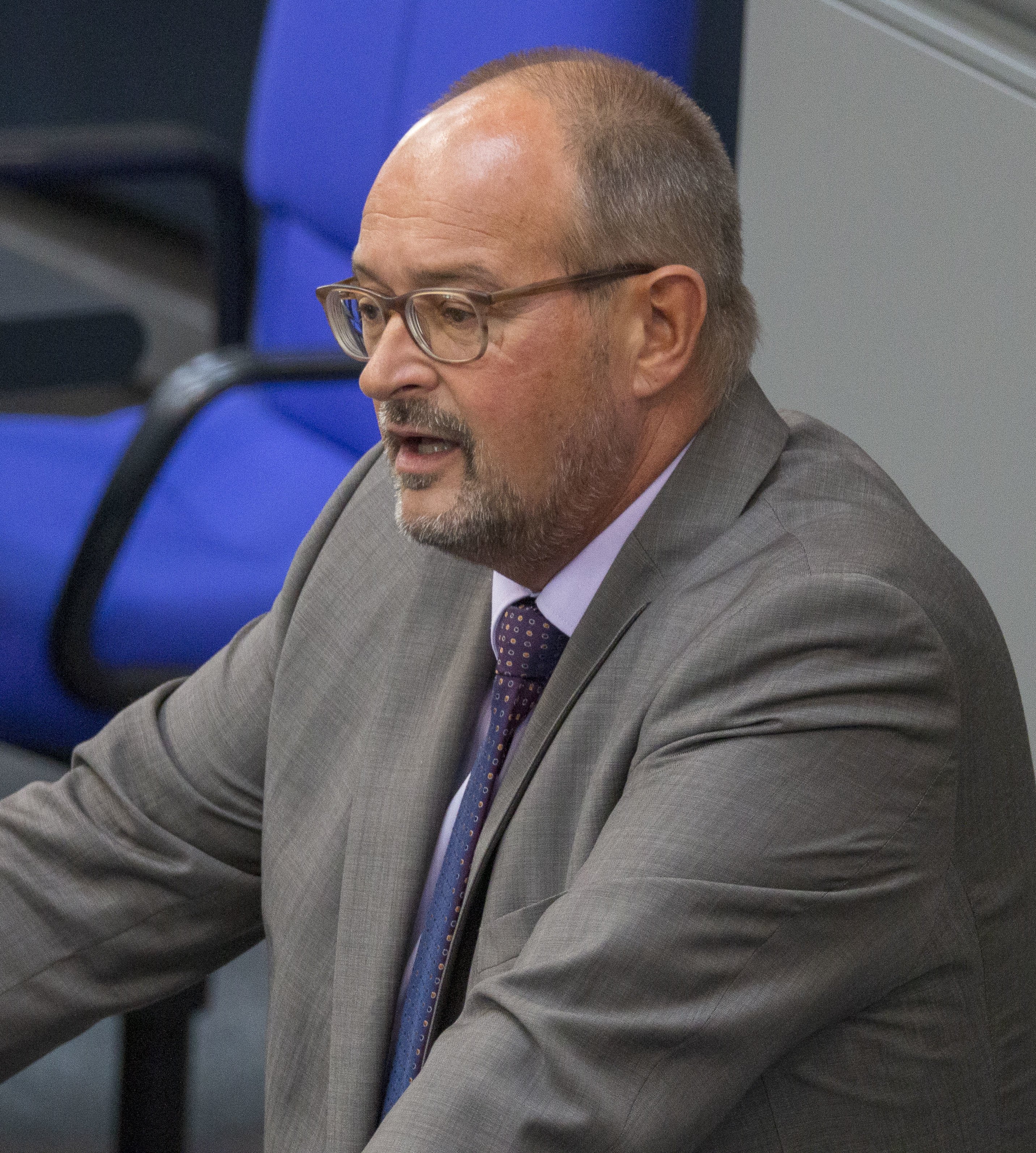 Uwe Witt, Mitglied des Deutschen Bundestages, während einer Plenarsitzung am 2. Juli 2020 in Berlin.